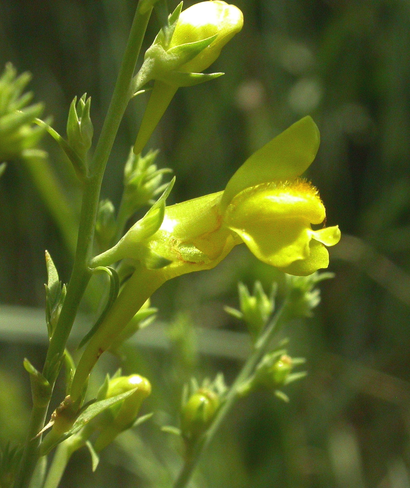 Linaria genistifolia, Floriánek near Moravský Krumlov, Czech Republic